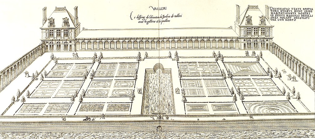 Jardin du château de Vallery avec sa galerie, ses pavillons et son étang.